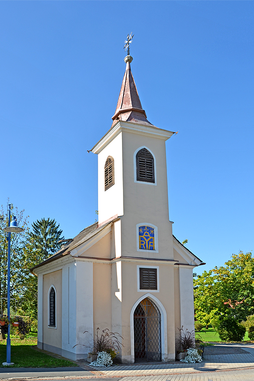 Obervogau Ortskapelle ObjektID: 82448